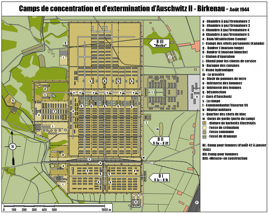 Traduction de la carte en français